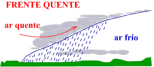 Warm front - Frente quente